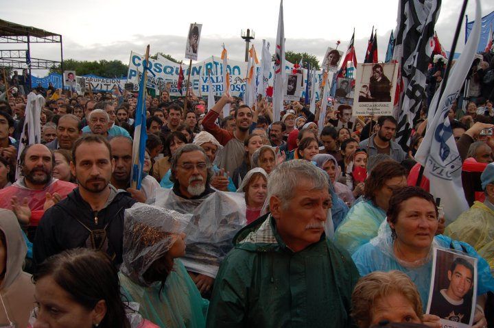 Acto de recuperación del terreno donde función el Centro Clandestino de Detención (CCD) de La Perla, Córdoba.